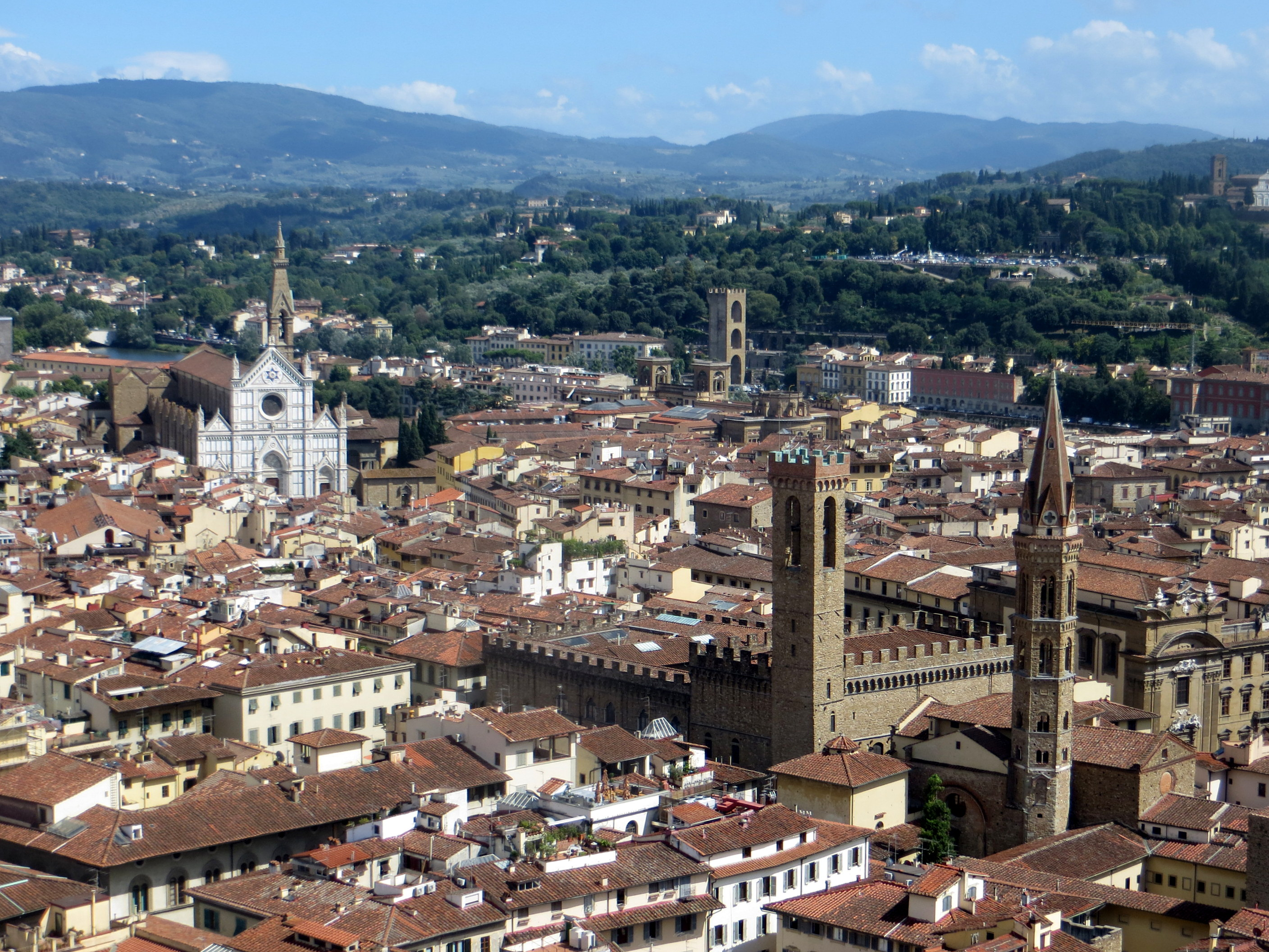 Veduta dal Campanile di Giotto: a destra il campanile della Badia e accanto quello del Bargello. A sinistra la Basilica di Santa Croce